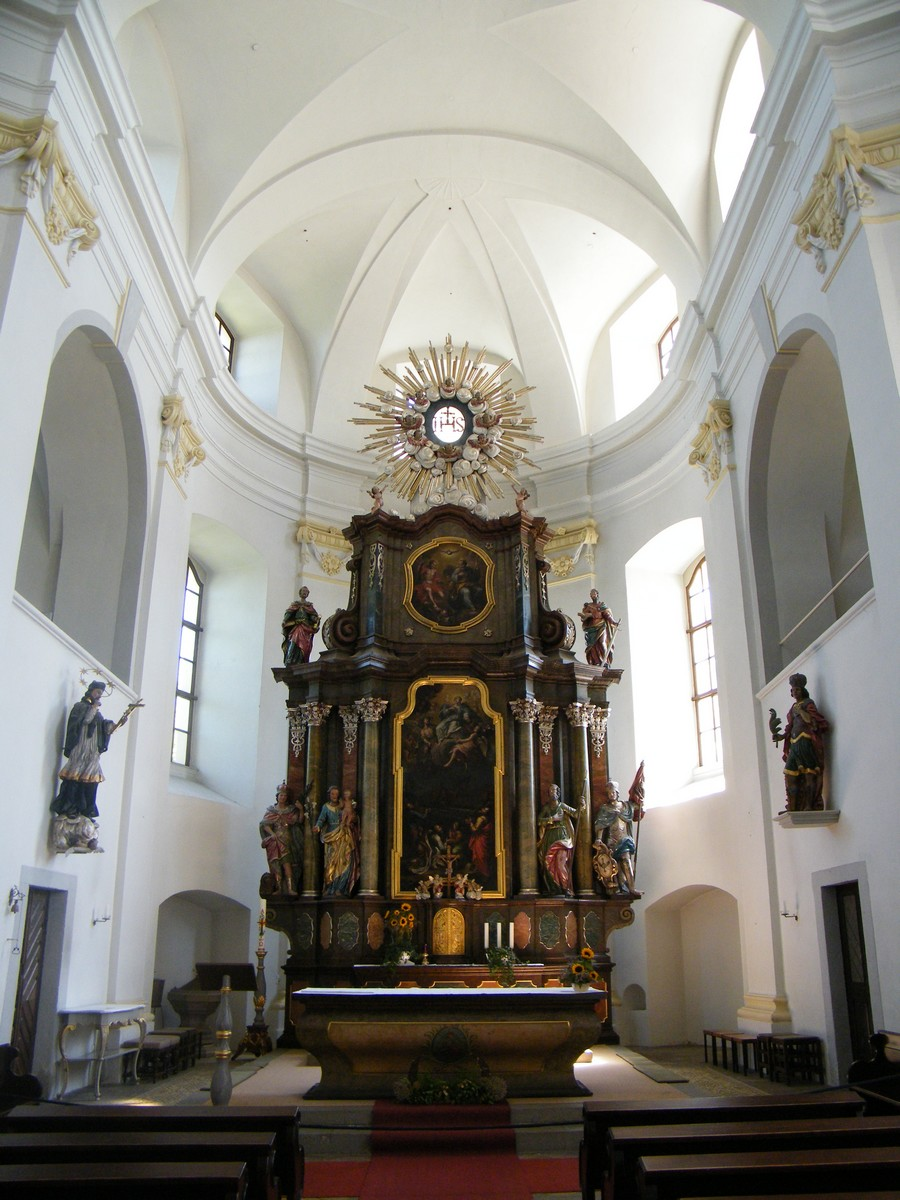 Kostel Nanebevzetí Panny Marie v Schirgiswalde, hlavní oltář